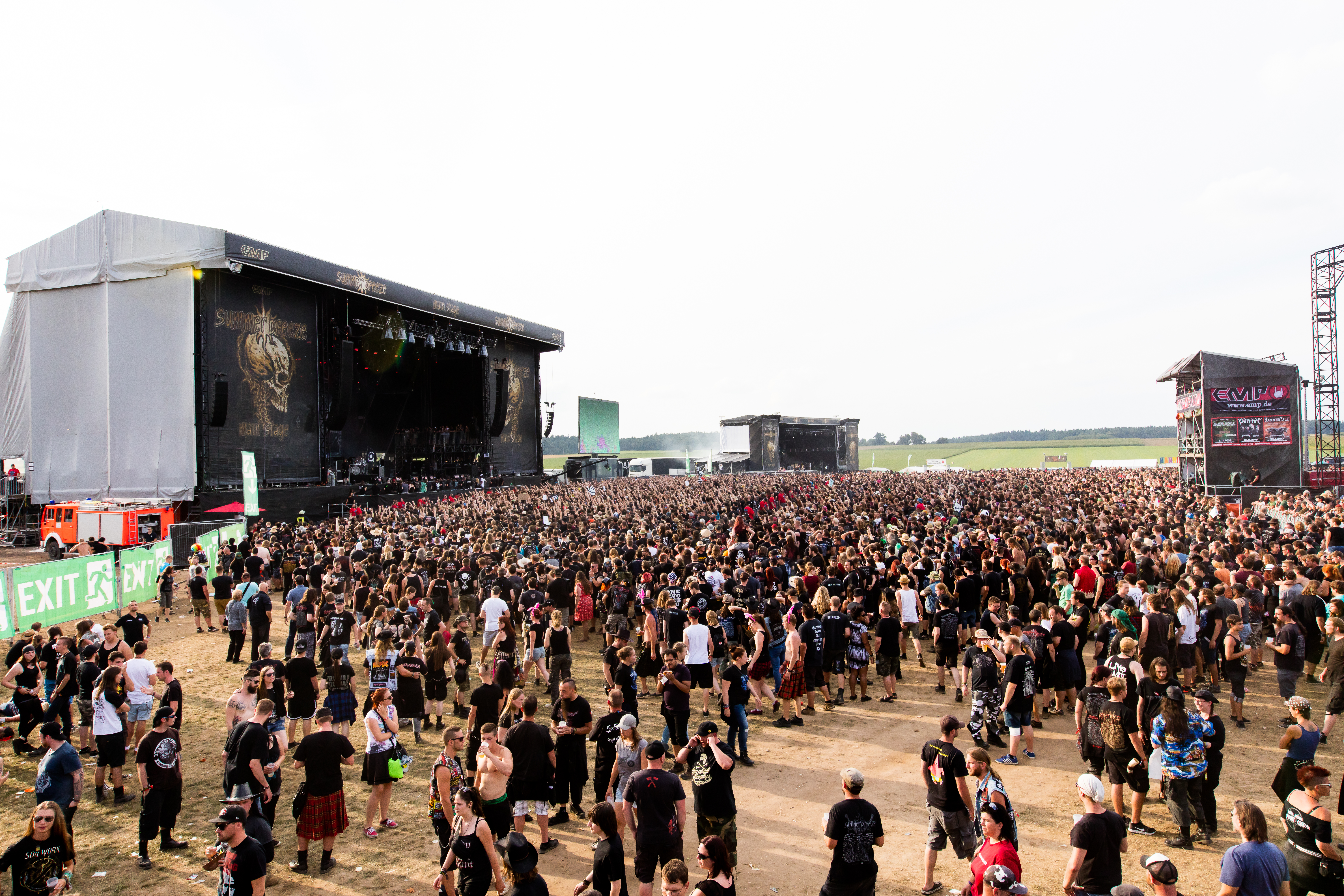 Festivalgelände during Summer Breeze 2016 at , Dinkelsbühl, Bayern, Germany on 2016-08-19, Photo: Sven Mandel